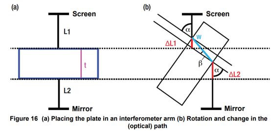 מייקלסון 6